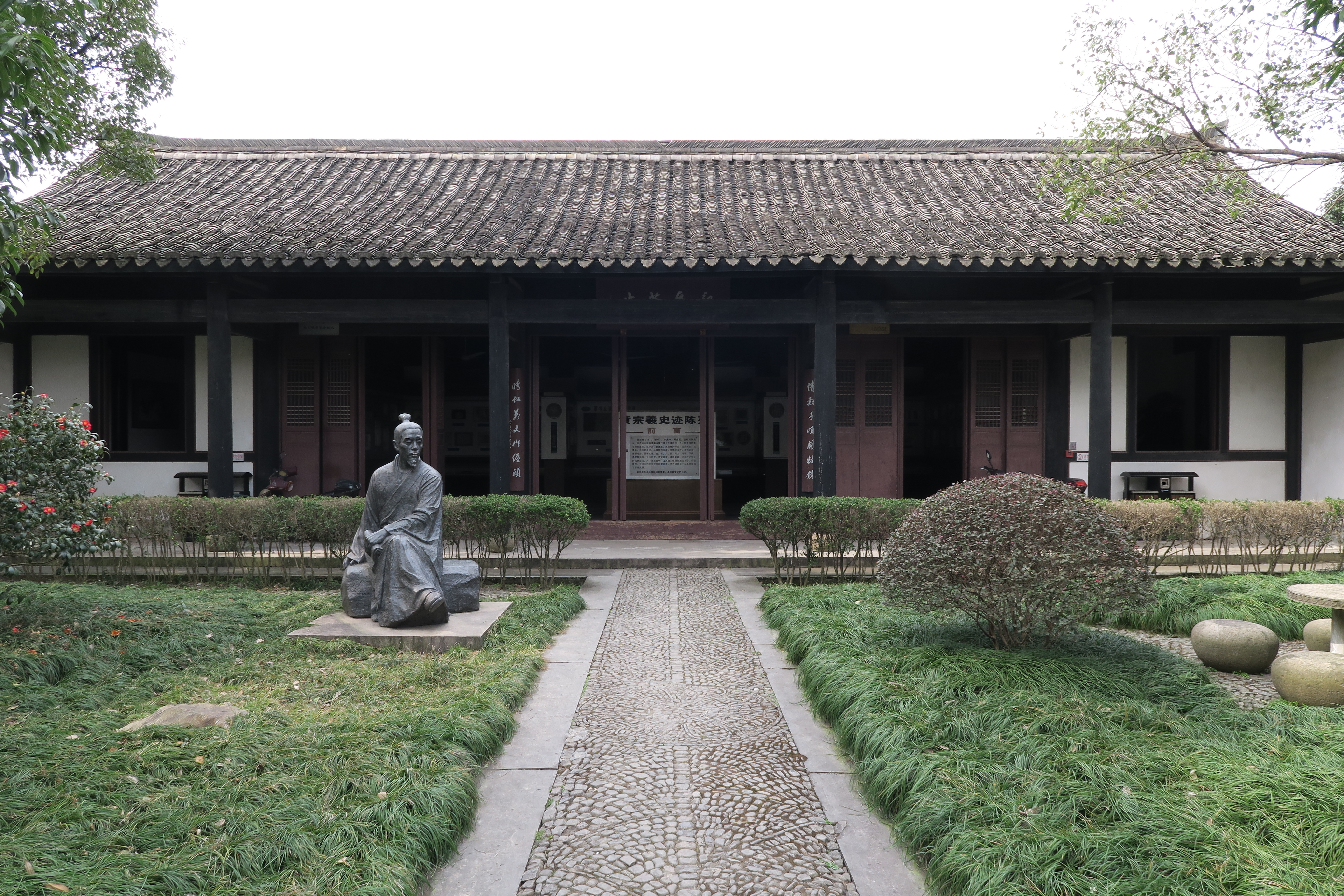 余姚黄宗羲墓